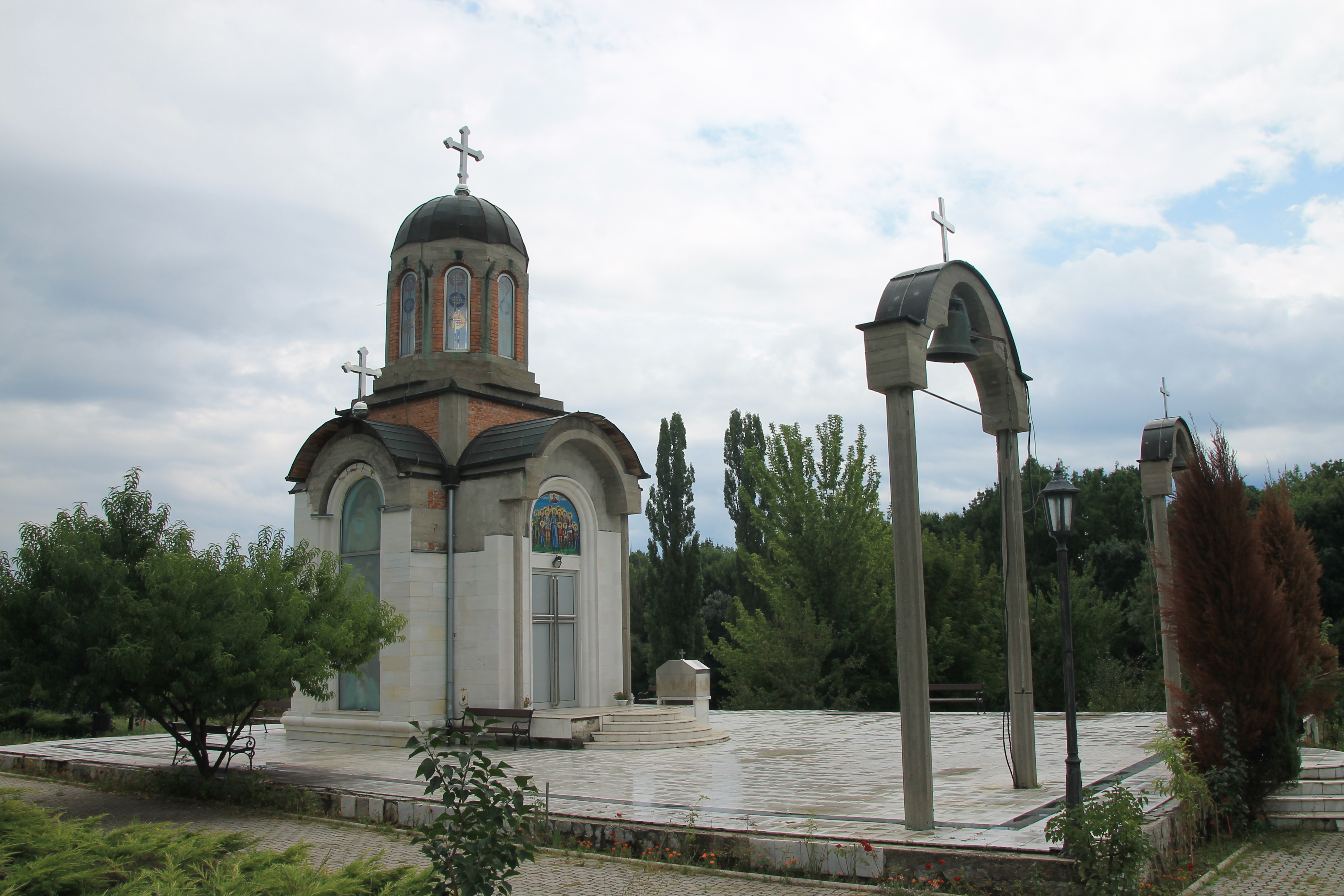 Crkva kragujevačkih mučenika (Kragujevac)